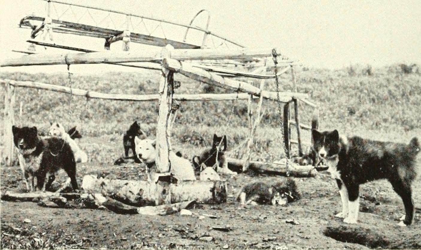 SLEDGE-DOGS AT REST